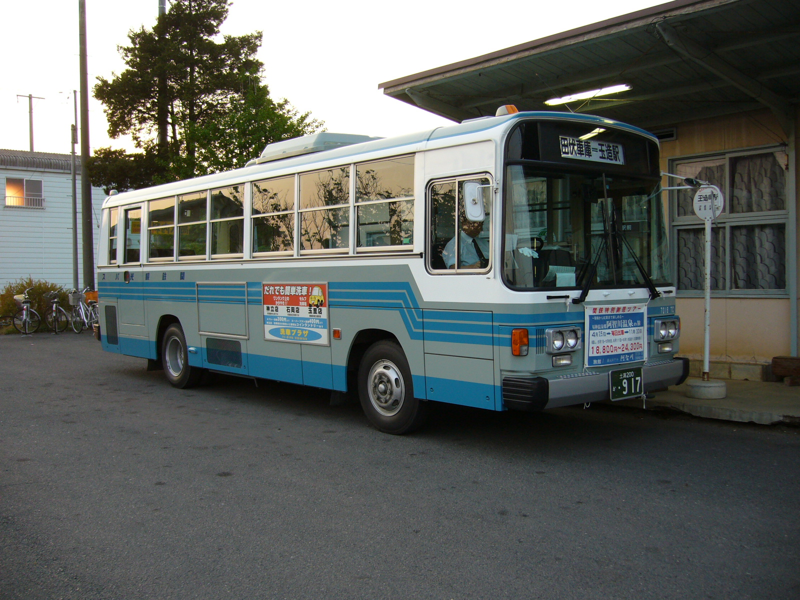 kantetsu-kankou-bus,tamatukuri-station,namegata-city,japan